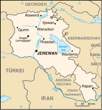 Armenien mit Berg-Karabach (Aserbeidschan)